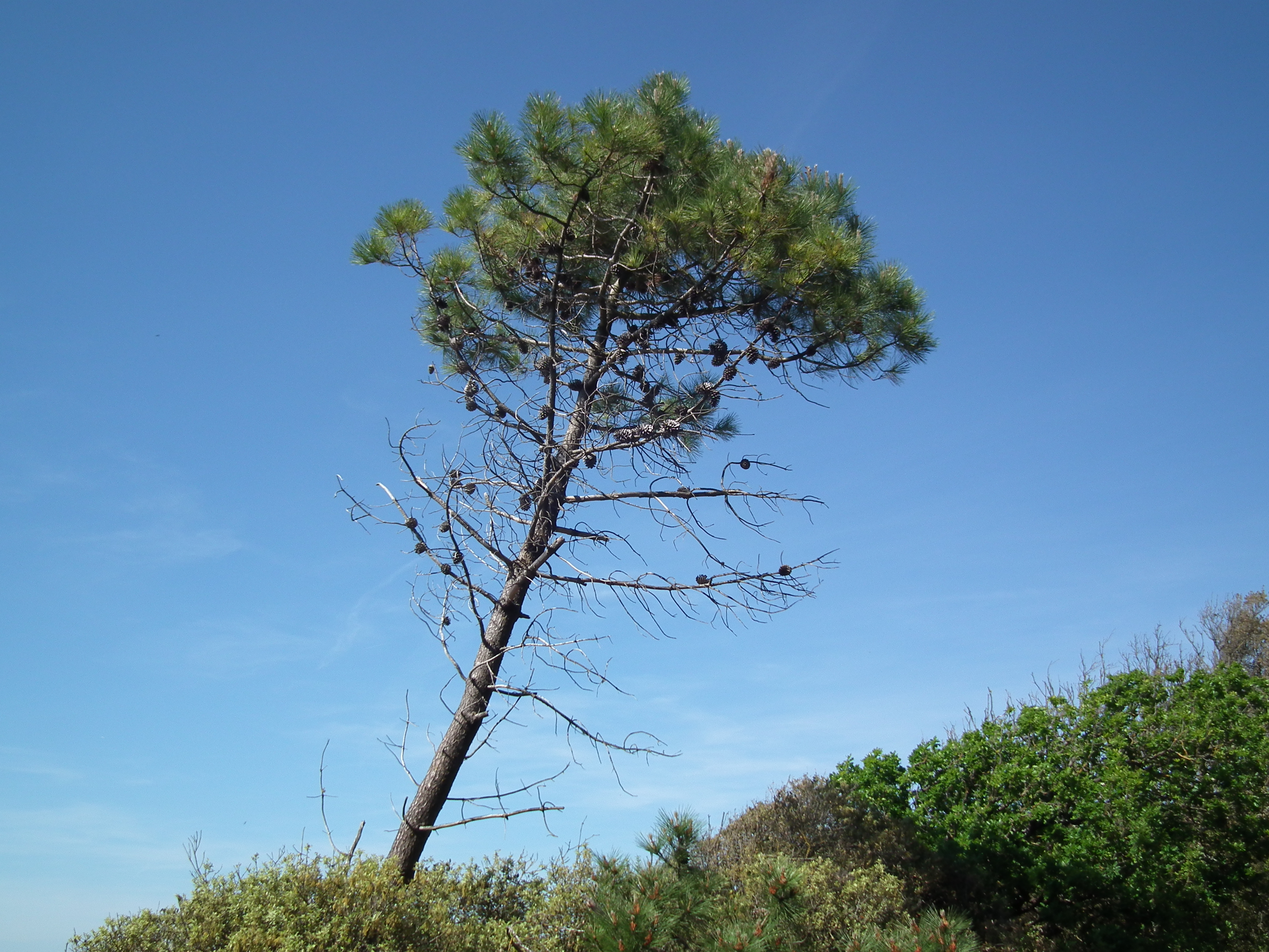 Un pin maritime sur la corniche de Suzac, à Saint-Georges-de-Didonne (Charente-Maritime)